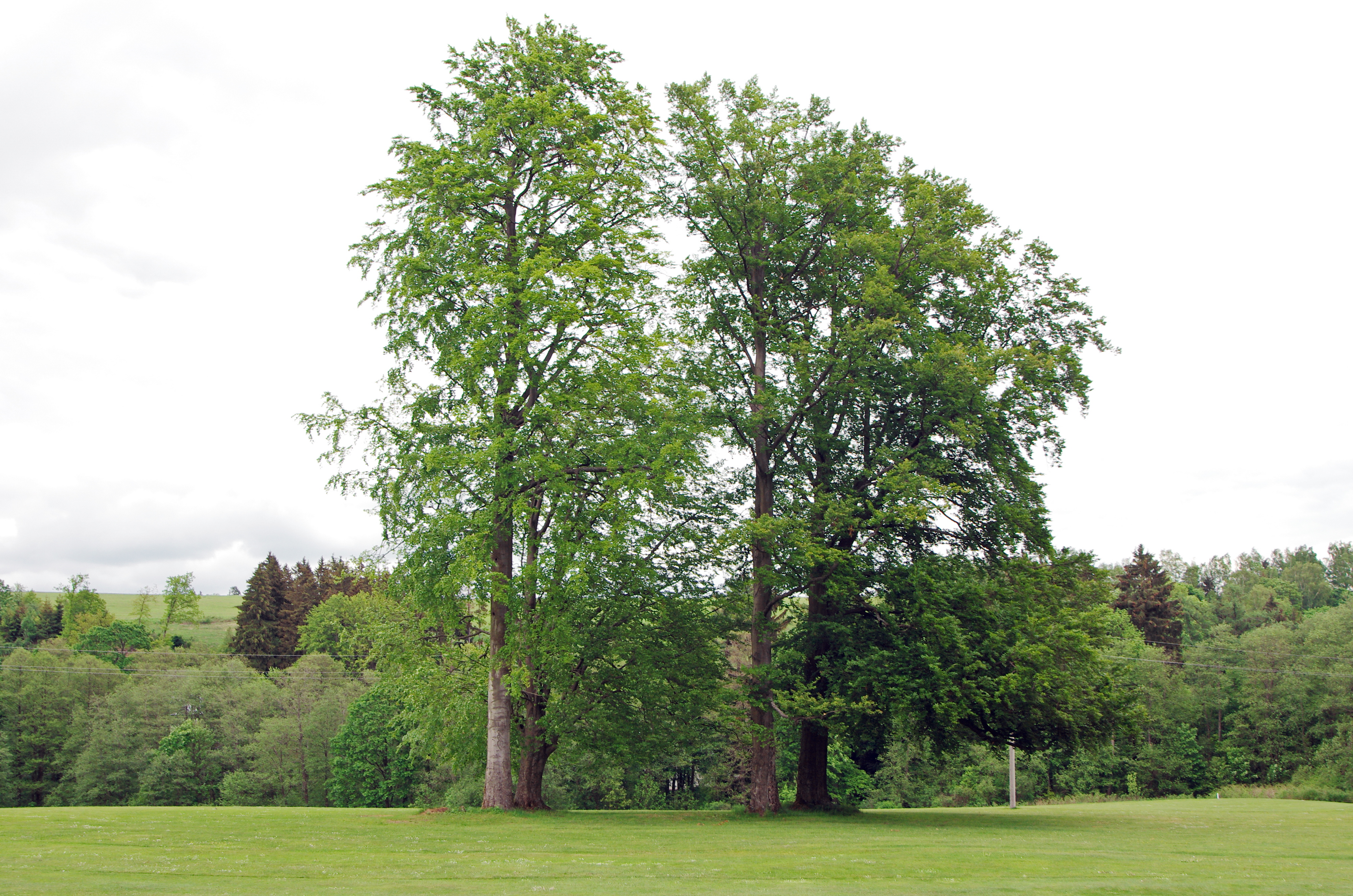 Památné stromy Zámecká alej a skupina buků v Horních Lubech, skupina buků, okres Cheb